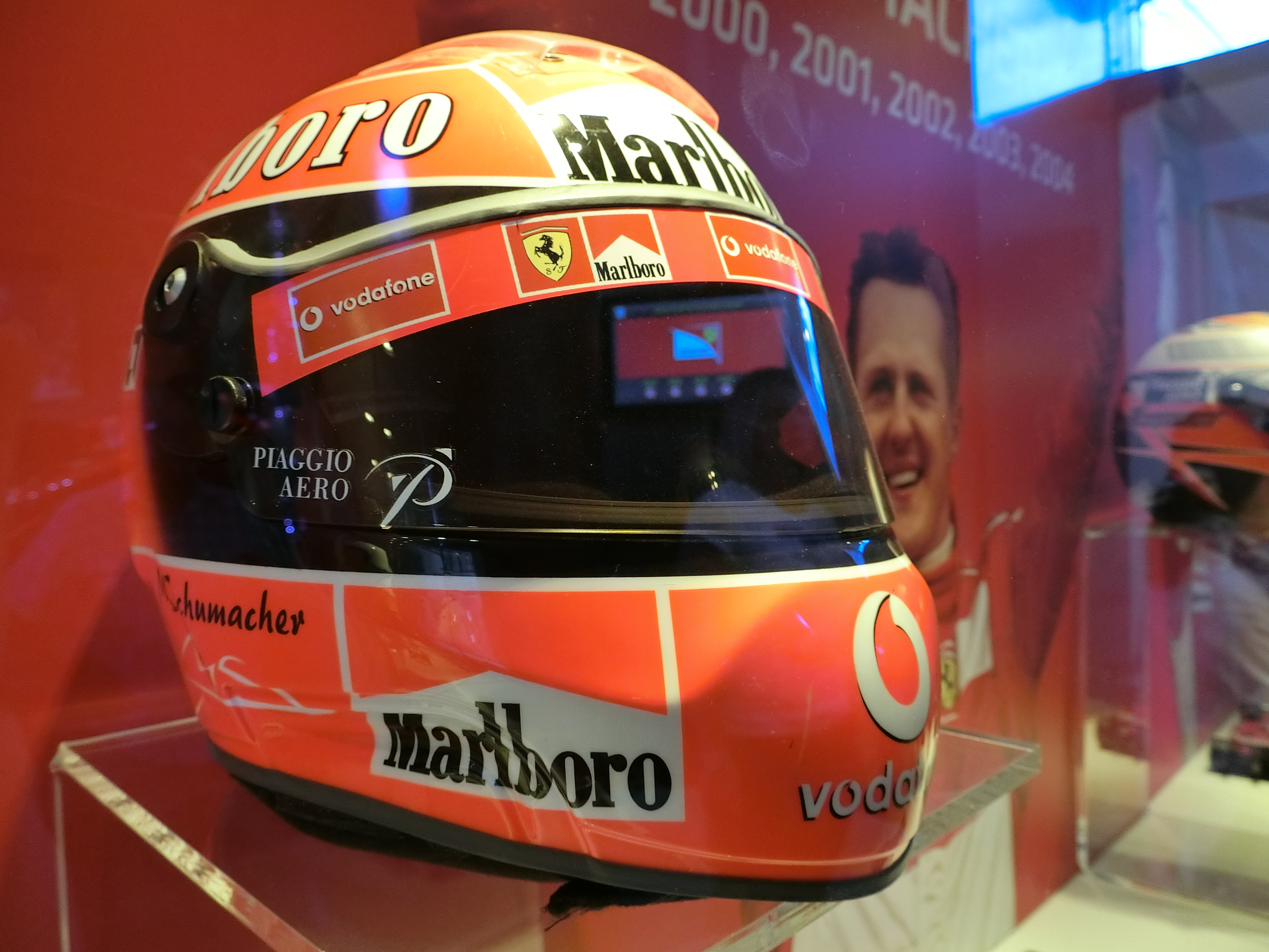 トロフィーの下の展示